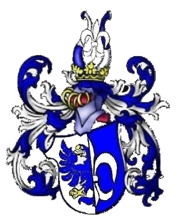 Erb Přibislavských z Modlíkova